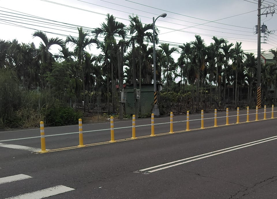 回復型導桿通常會設置在道路的中間或者兩側上